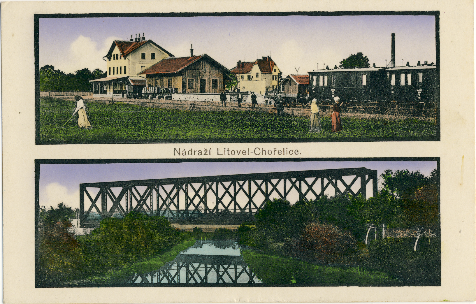 Pohlednice zobrazující nádraží Litovel-Chořelice (v roce 2017 Litovel-Předměstí) a železniční most v Litovli.